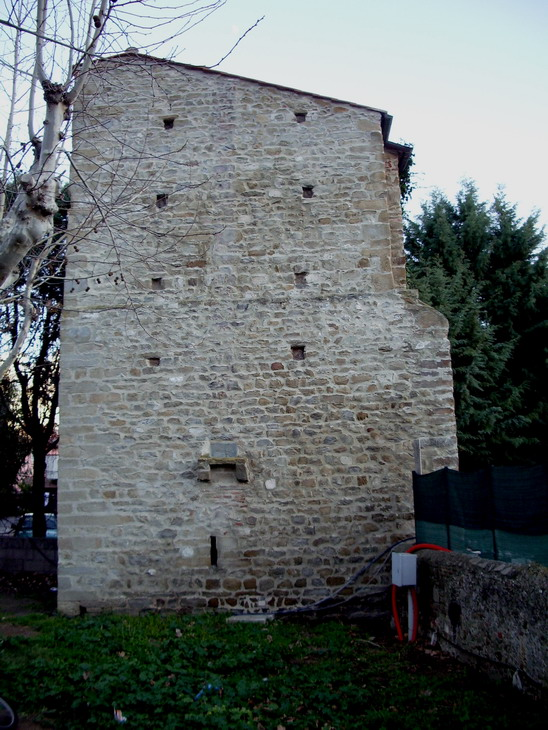 La Torre Lilli a Castiglione della Pescaia